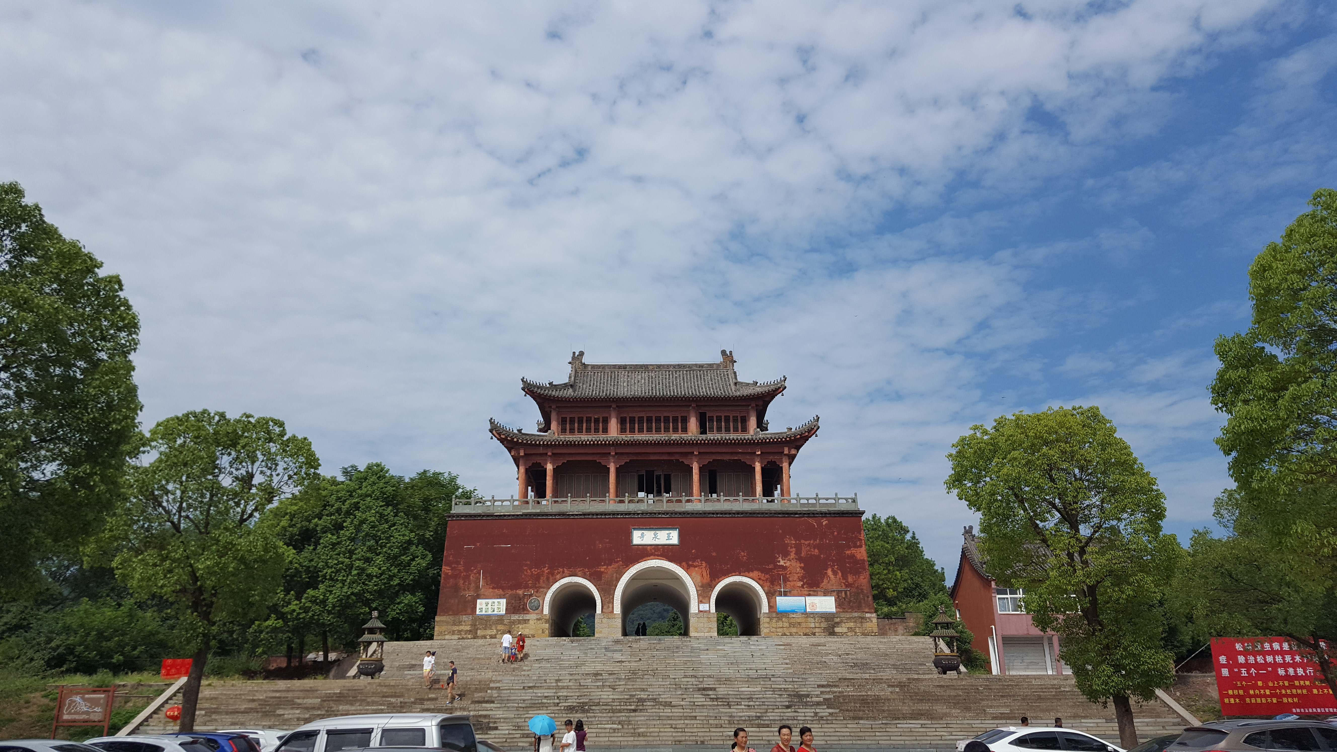 中文（中国大陆）: 当阳玉泉寺